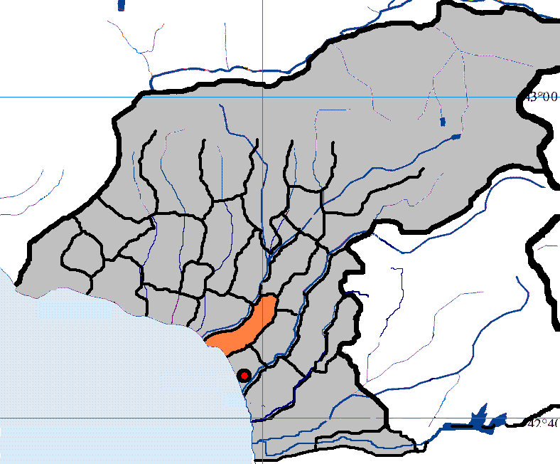 село Меркула в Очамчирском районе